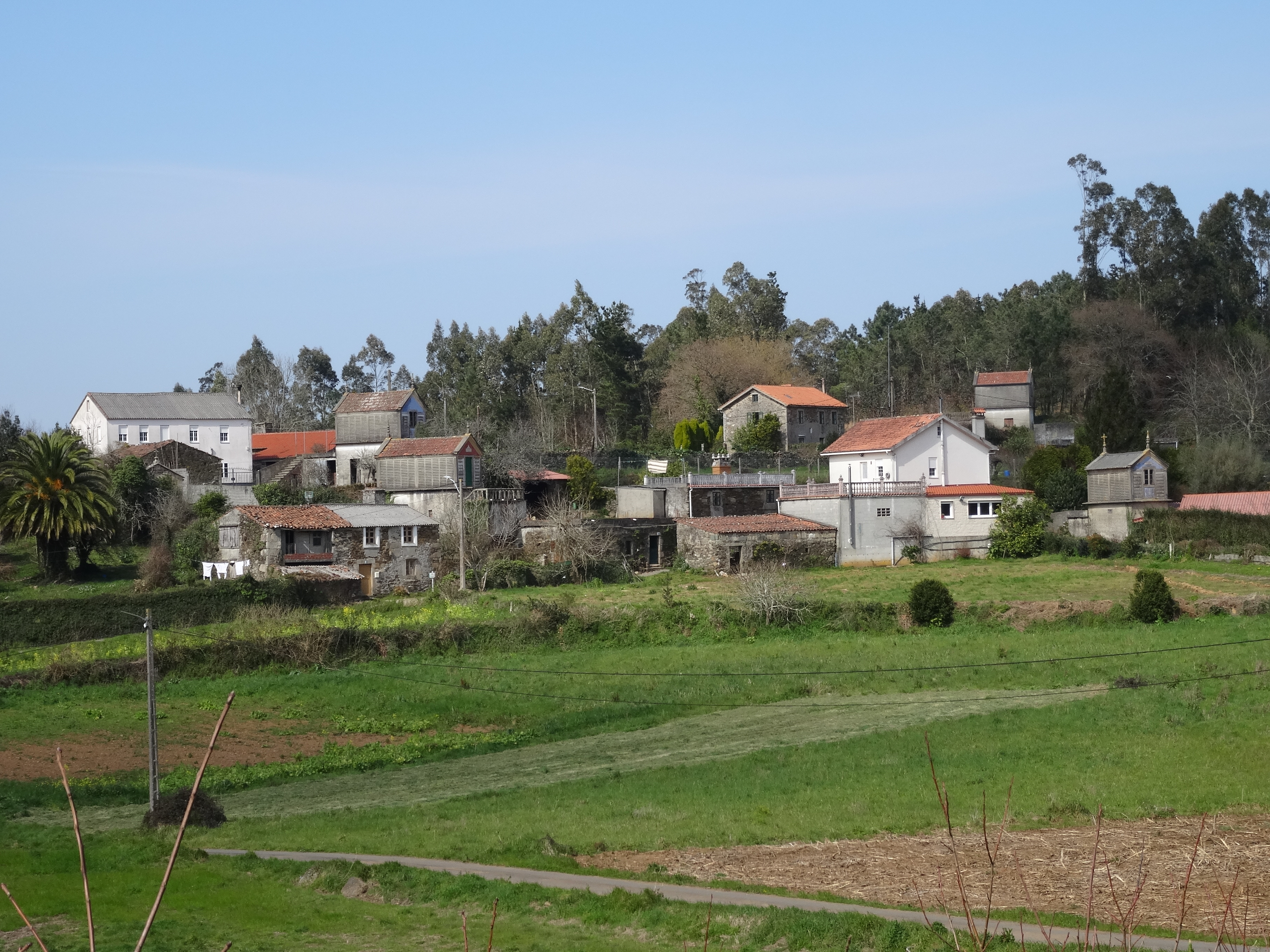 Lugar de Goiáns de Arriba na parroquia de Goiáns, Carballo.